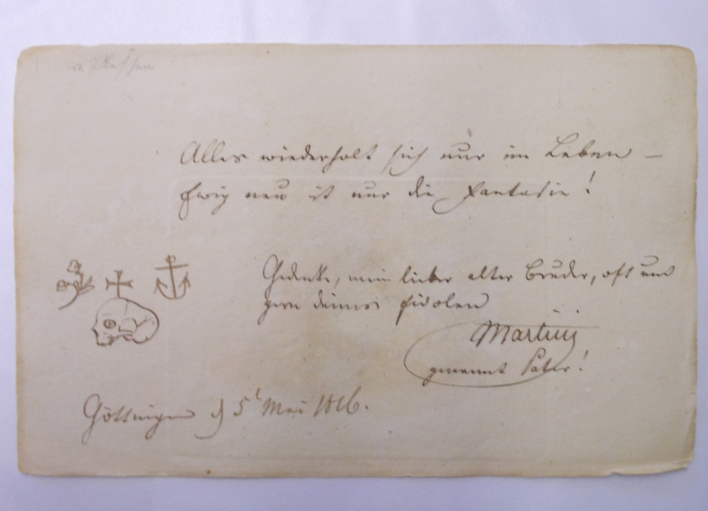 Eintrag der Lübecker Artztes Martini am 5. Mai 1816 als Student in Göttingen in das Stammbuch des Mecklenburgers Otto von Plessen. Beschreibung des Stadtarchivs Göttingen: "Signatur: Stabu 237 (Bl. 151r+v), Einträger: Martini, [Christian] (genannt Pater). - Nation: Deutschland. - Herkunft: Lübeck. - Beruf: stud. med. - Matrikel: Göttingen 24263. Eintragung: Göttingen, 1816.05.05. - Sprache: dt. - Illustration: Freundschaftsmotiv (Vergißmeinnicht, Kreuz, Anker und Totenkopf, Tinte)."